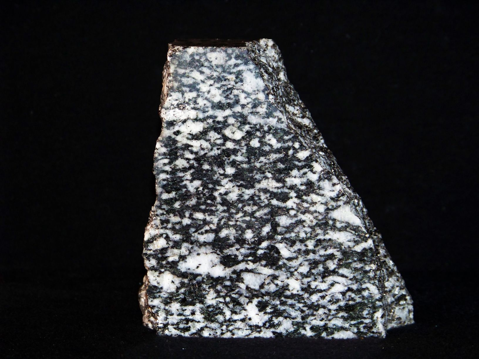 Syenit - zgład, dolny Śląsk, POlska